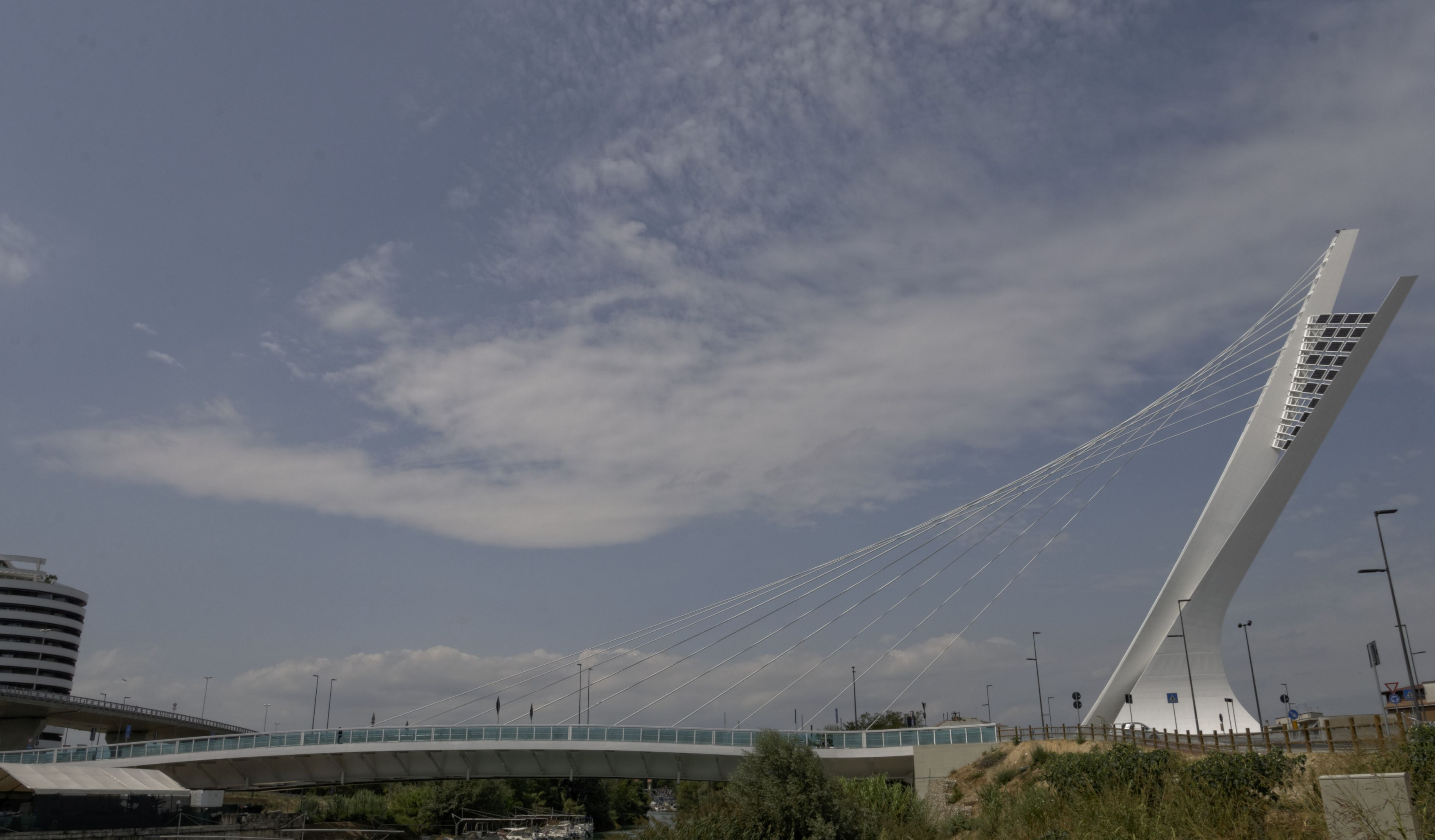 Pescara -Ponte Flaiano- 2017